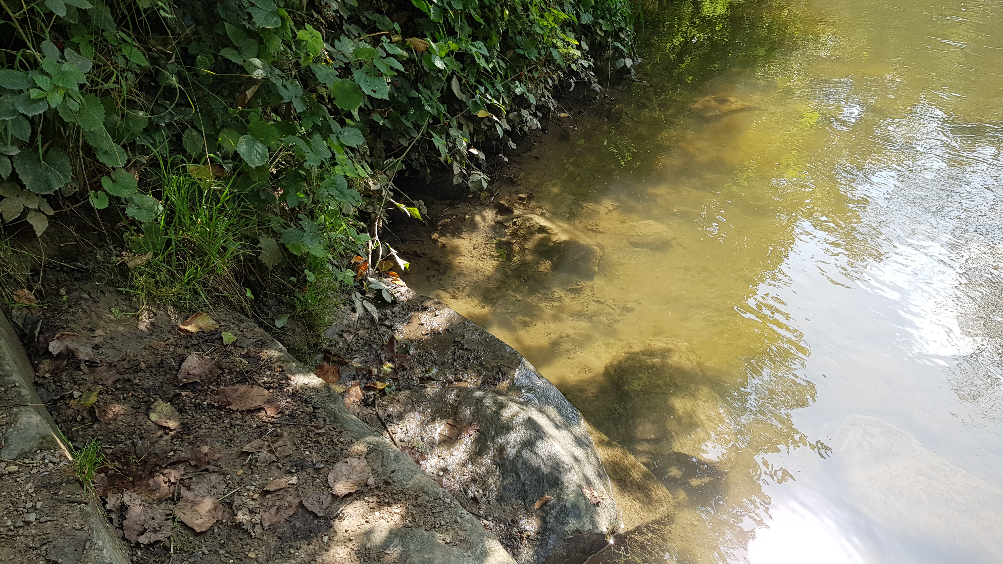 Sint-Jansbron te Valkenburg, Limburg, Nederland